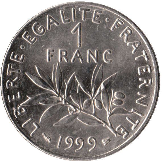 revers d'une pièce de 1 Franc 1999